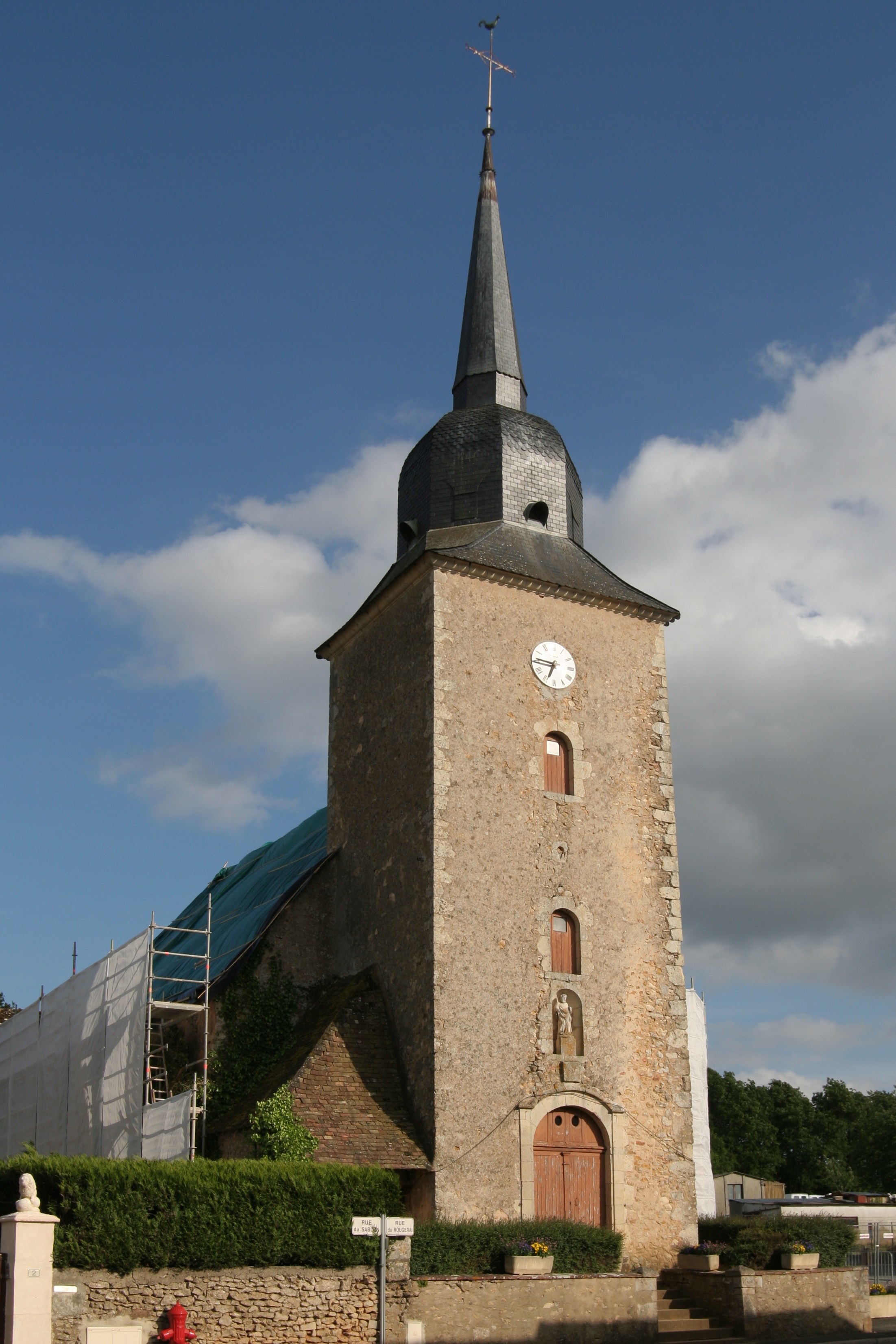 Église Saint-Pierre de Nuillé-le-Jalais.